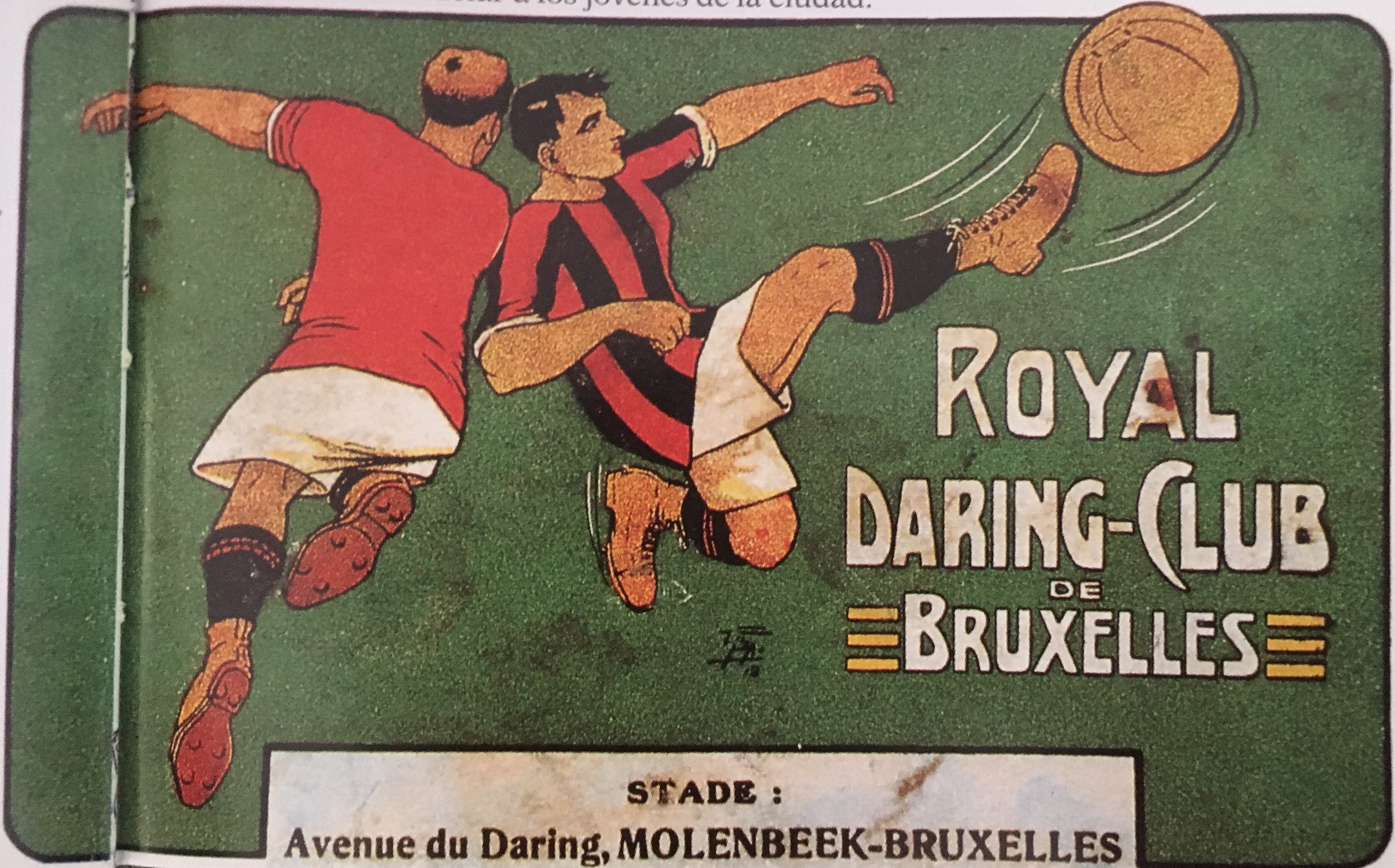 Cartel de un partido del Royal Daring Club de Bruselas. — Alfred Wahl, Historia del fútbol, del juego al deporte (pp. 30–31), colección «Biblioteca de bolsillo CLAVES» (nº 5), serie Deportes. Barcelona: Ediciones B, octubre 1997. Traducido del francés por Francesc Reyes; breve descripción en la página 155.